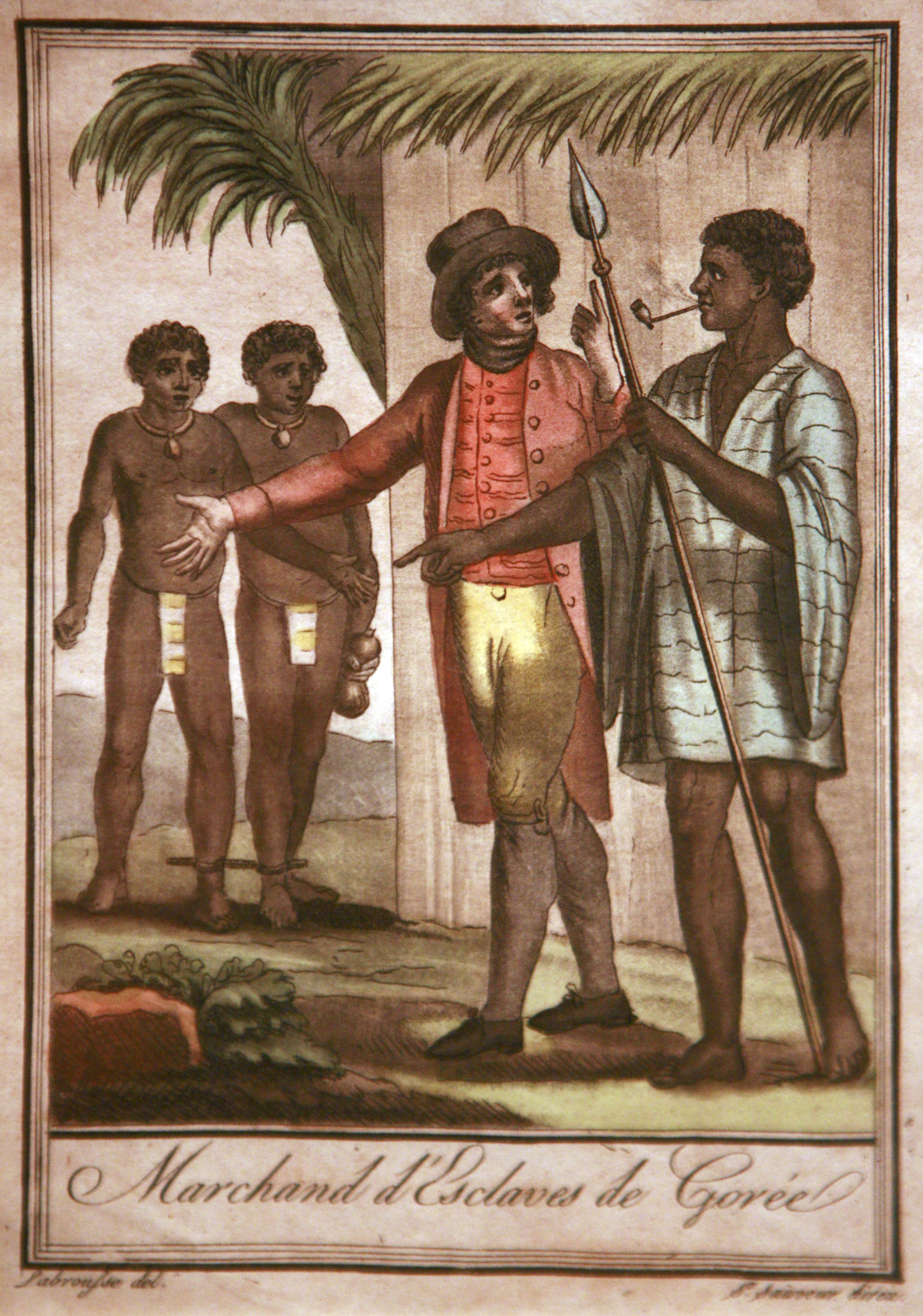 Slave traders in Gorés, by Jacques Grasset de Saint-Sauveur